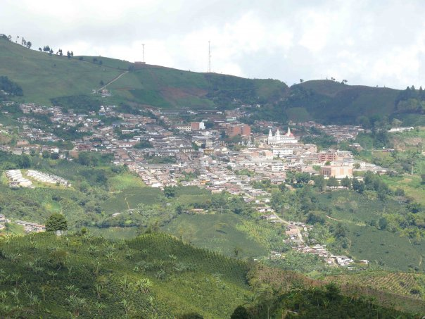 Concordia, Antioquia - Colombia